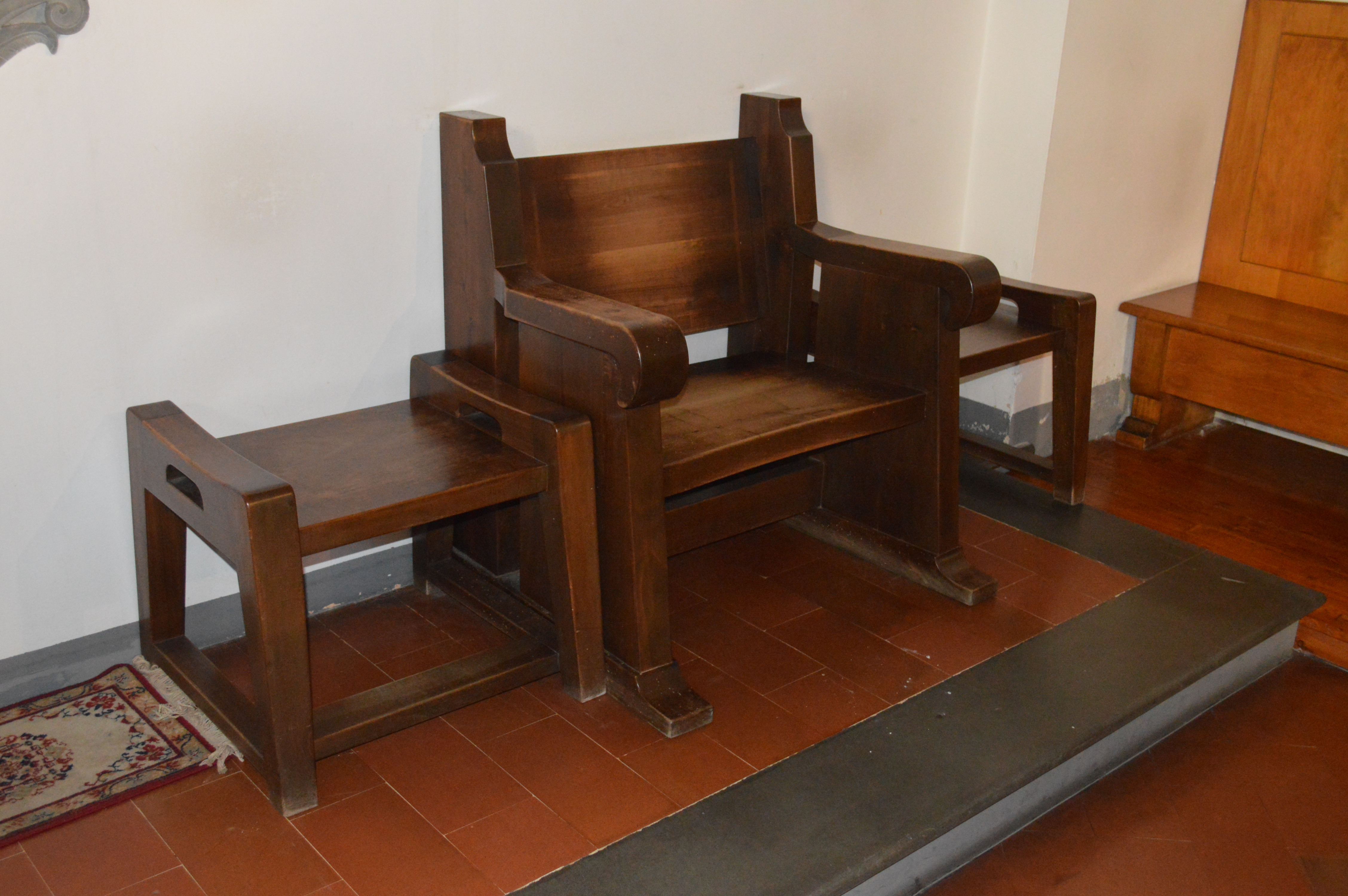 La sede, già cattedra provvisoria del duomo di Firenze.